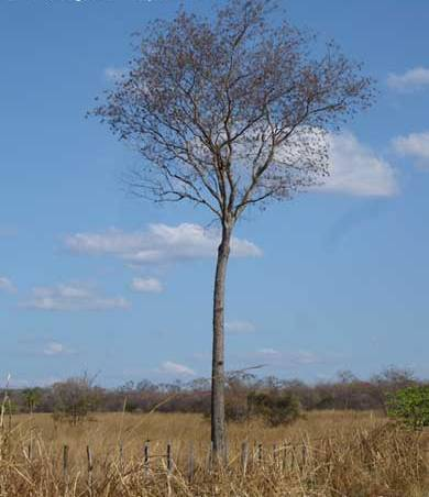 Árvore de aroeira-do-sertão (Astronium urundeuva).